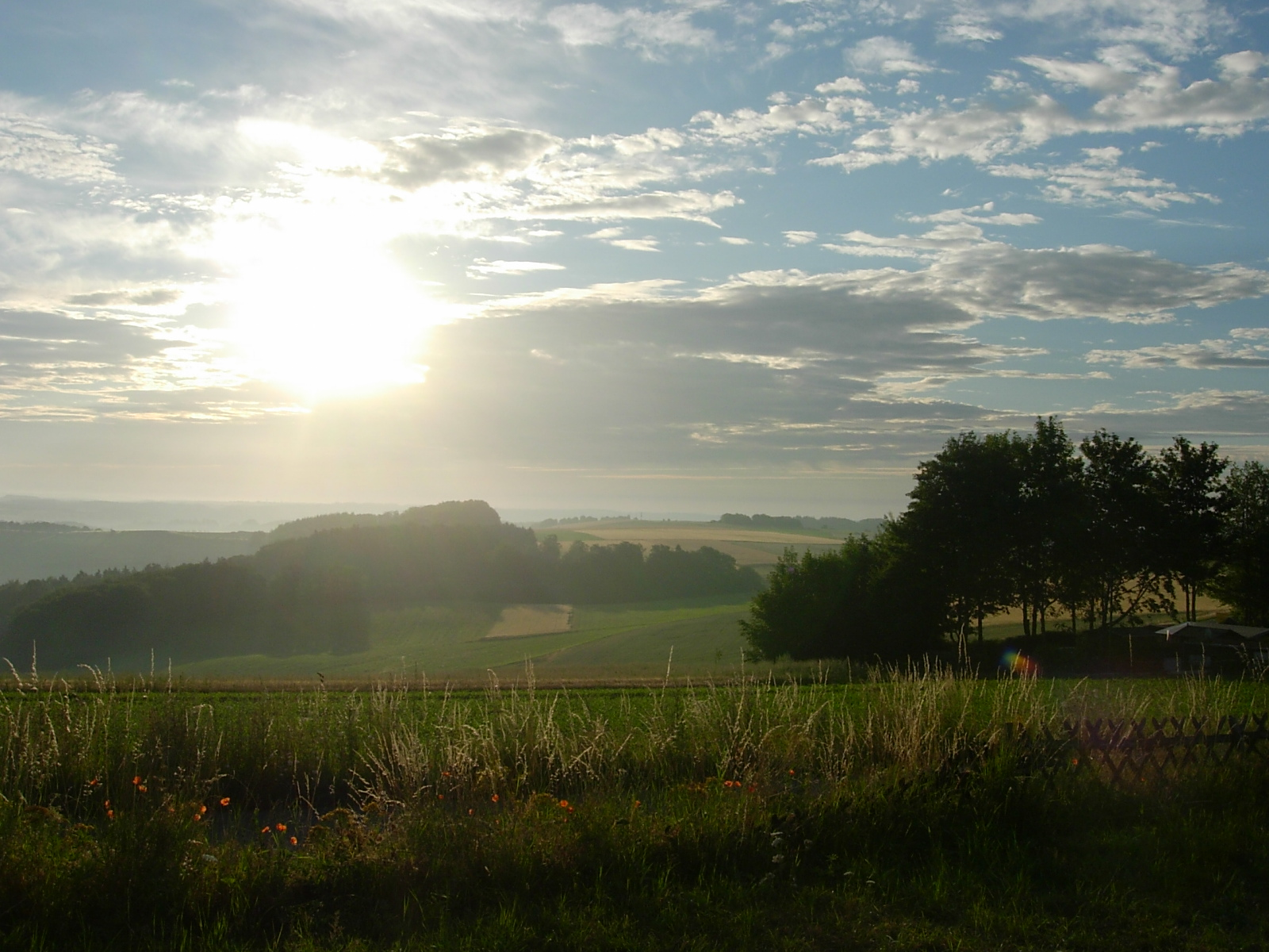 Sonnenaufgang über der Vulkaneifel. Fotografiert im Juli 2006 auf dem Wohnmobil-Stellplatz am Pulvermaar mit Blick nach Osten.